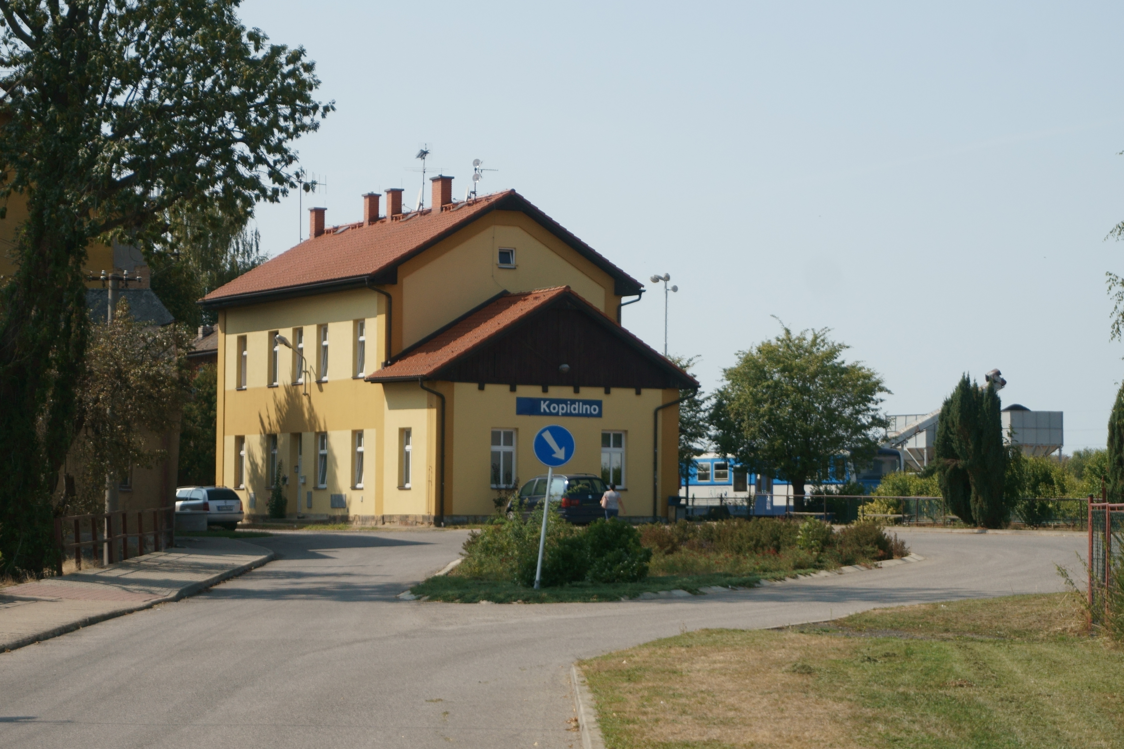 Kopidlno - železniční stanice